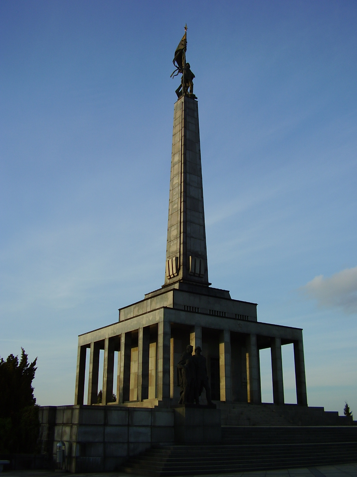 Slavín, a military cemetery, Bratislava, Slovakia. Pamätník s cintorínom sovietskych vojakov padlým pri oslobodzovaní Bratislavy a okolia na jar 1945 bol dostavaný roku 1960 podľa projetku Jána Svetlíka. Na jeho plastickej výzdobe sa samostatnými dielami zúčastnili sochári Tibor Bártfay, Jozef Kostka, Ján Kulich, Rudolf Pribiš, Ladislav Snopek a Alexander Trizuljak.